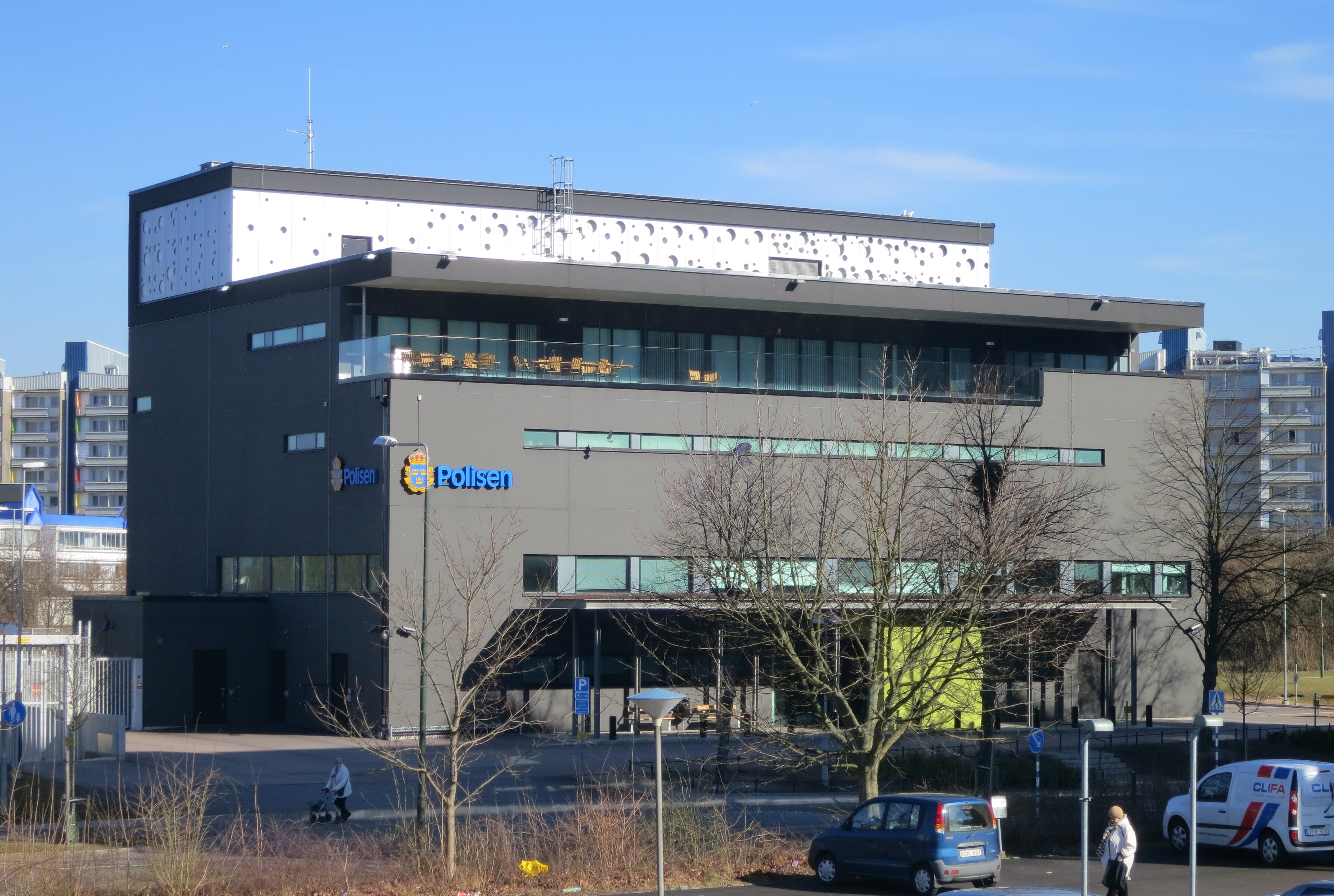 Rosengårds polishus, Malmö